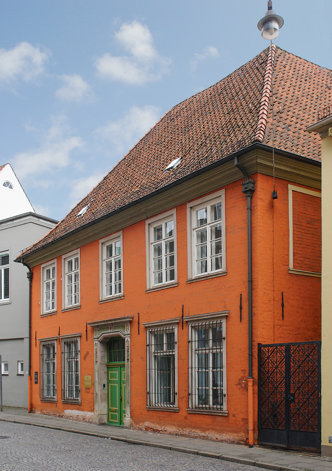 Bremen: Haus Heineken in der Sandstraße 3. Das abgebildete Objekt ist ein geschütztes Kulturdenkmal in der Freien Hansestadt Bremen, mit der Nr. 1097 beim Landesamt für Denkmalpflege registriert.